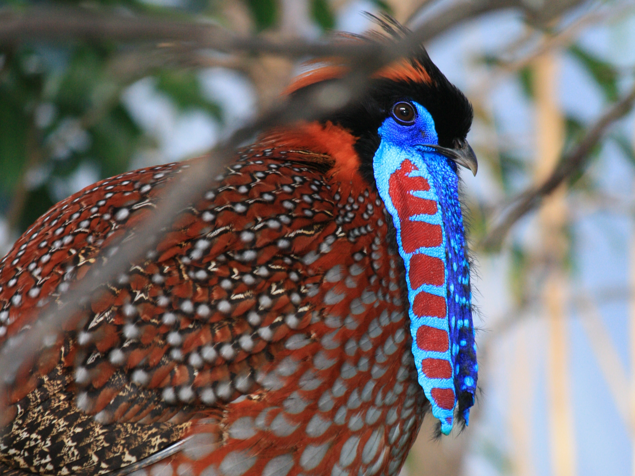 Satyr Temminckův v pražské Zoo